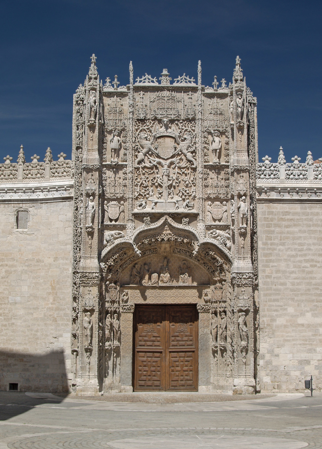 Fachada del Colegio de San Gregorio bajo el sol del verano.